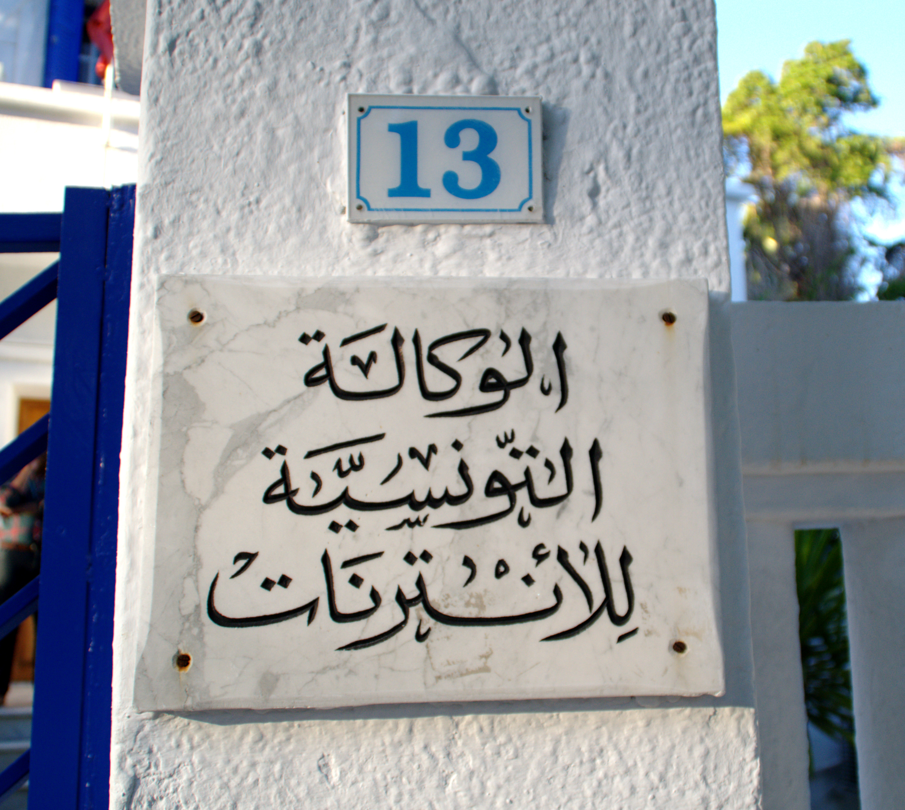 Plaque indiquant en arabe « Agence tunisienne de l'inernet »